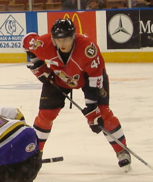 Alexander Nikulin - Manchester Monarchs vs. Binghamton Senators 1-5-2008